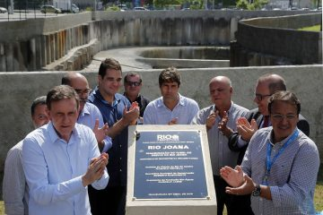 Prefeito Marcelo Crivella, da cidade do Rio de Janeiro, durante inauguração de desvio do Rio Joana.